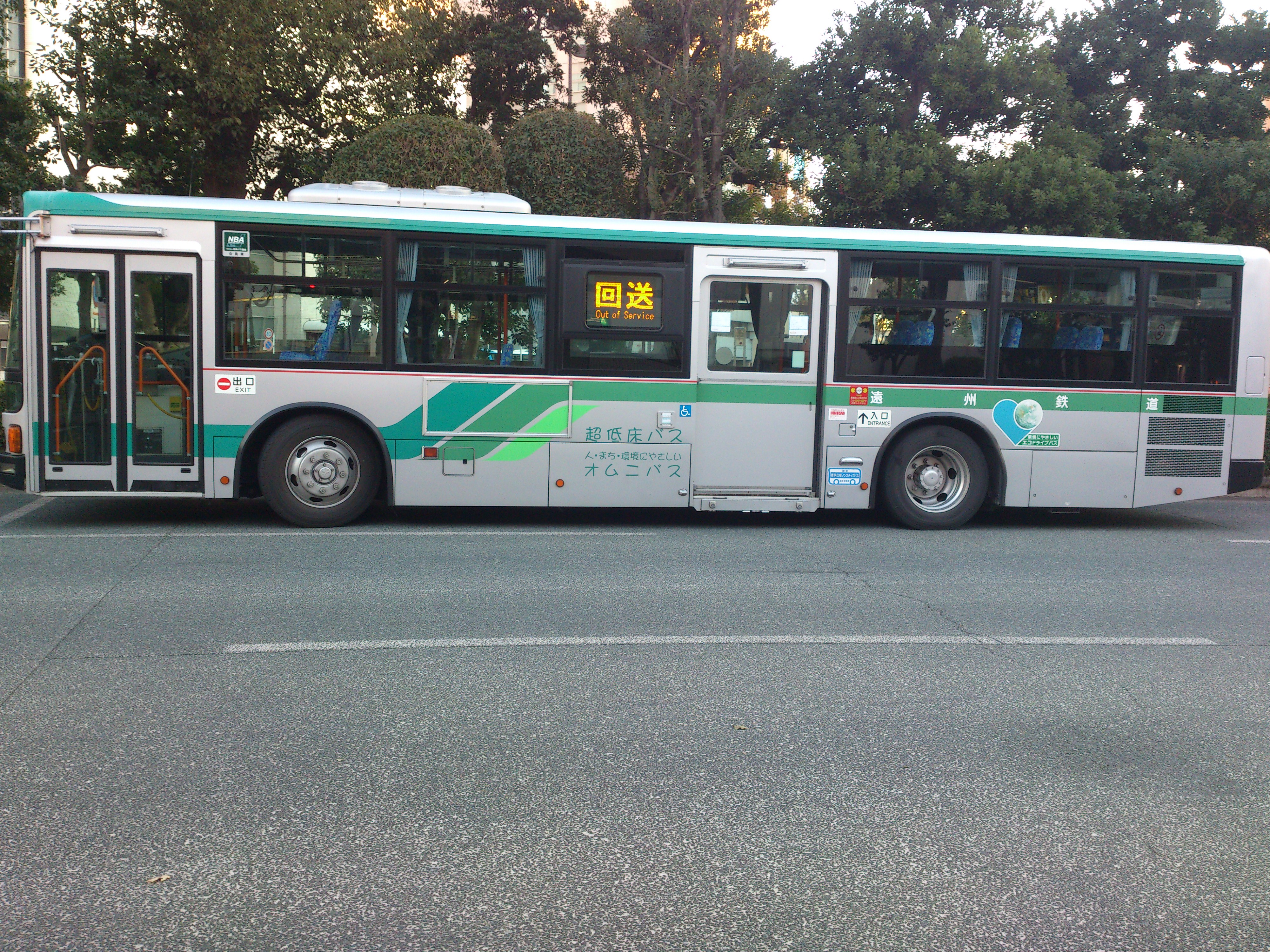 遠鉄バス エアロスター